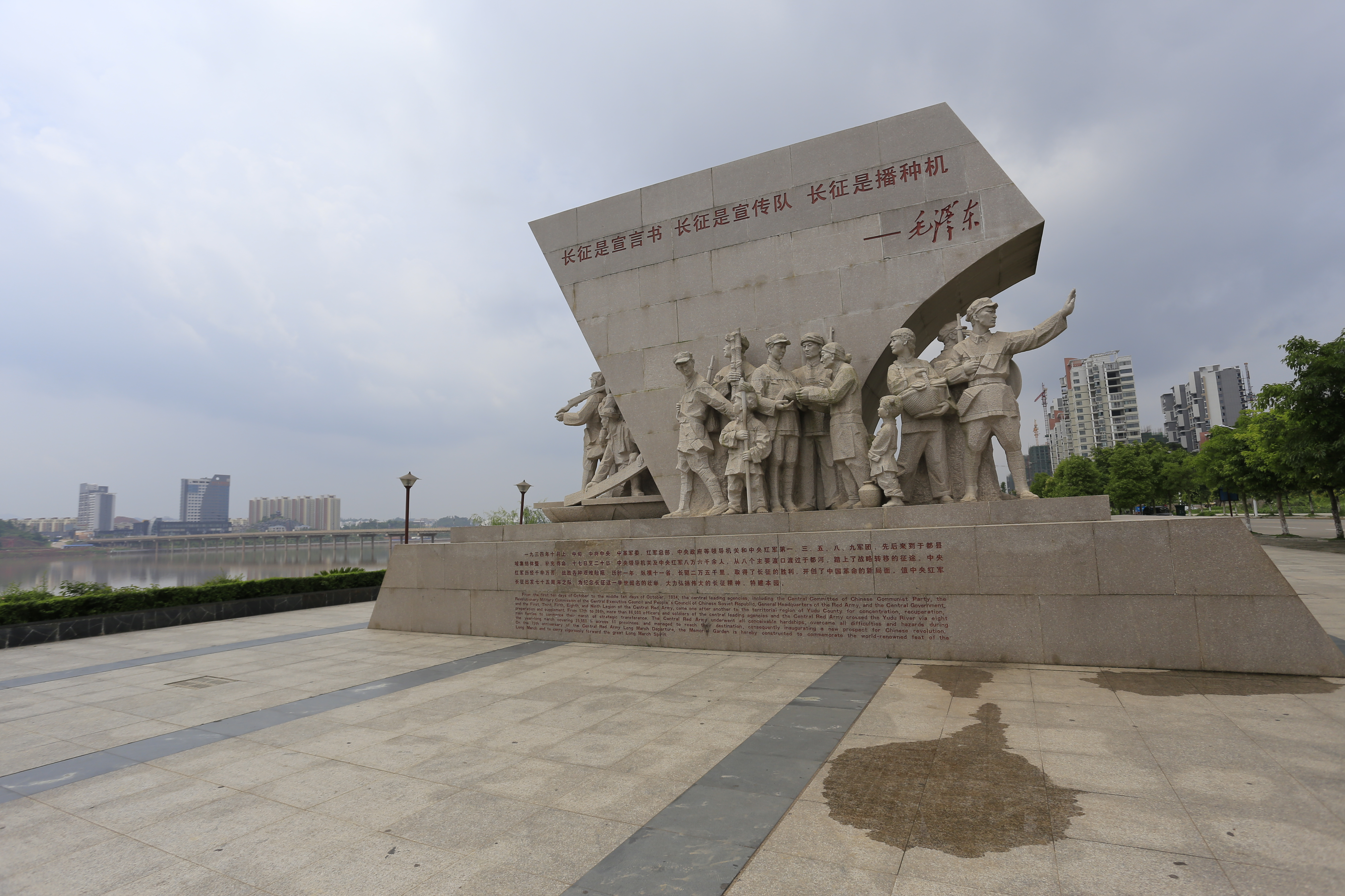 于都县中央红军长征出发地旧址——中央红军长征第一渡口（东门外渡口），中央红军长征出发地纪念园